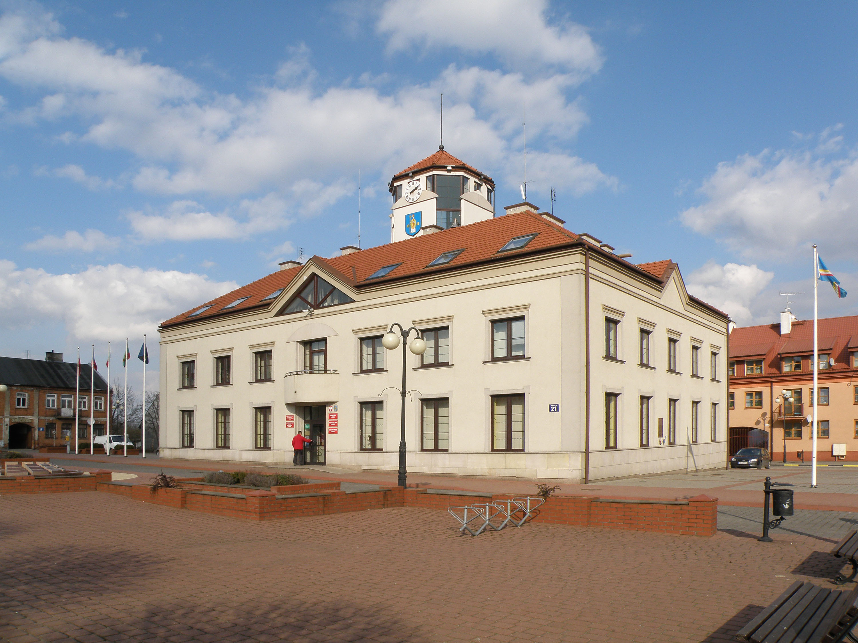 Serock (woj. mazowieckie, powiat legionowski) - Urząd Miasta i Gminy